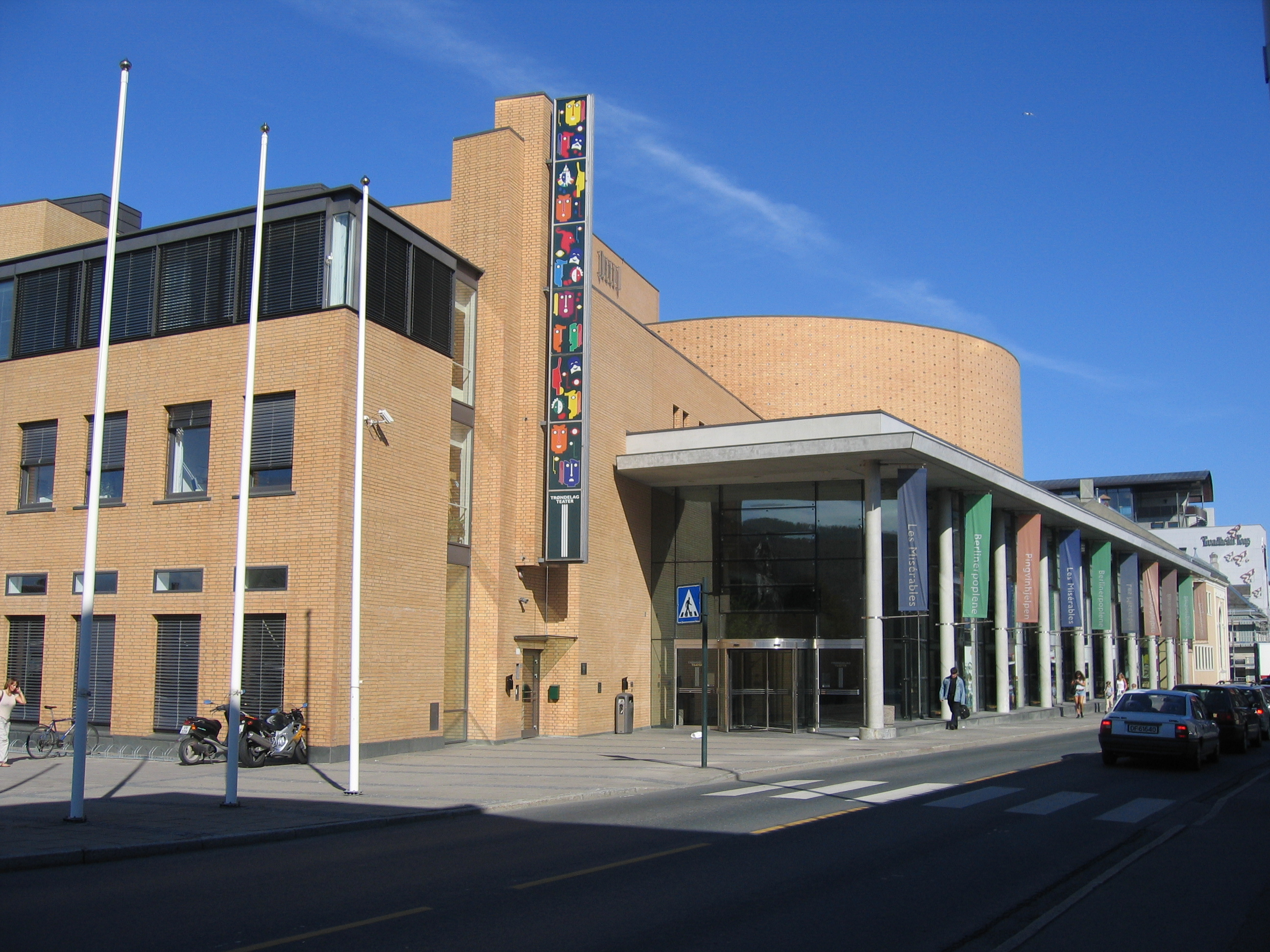 Trøndelag Teater, Trondheim, Norway.